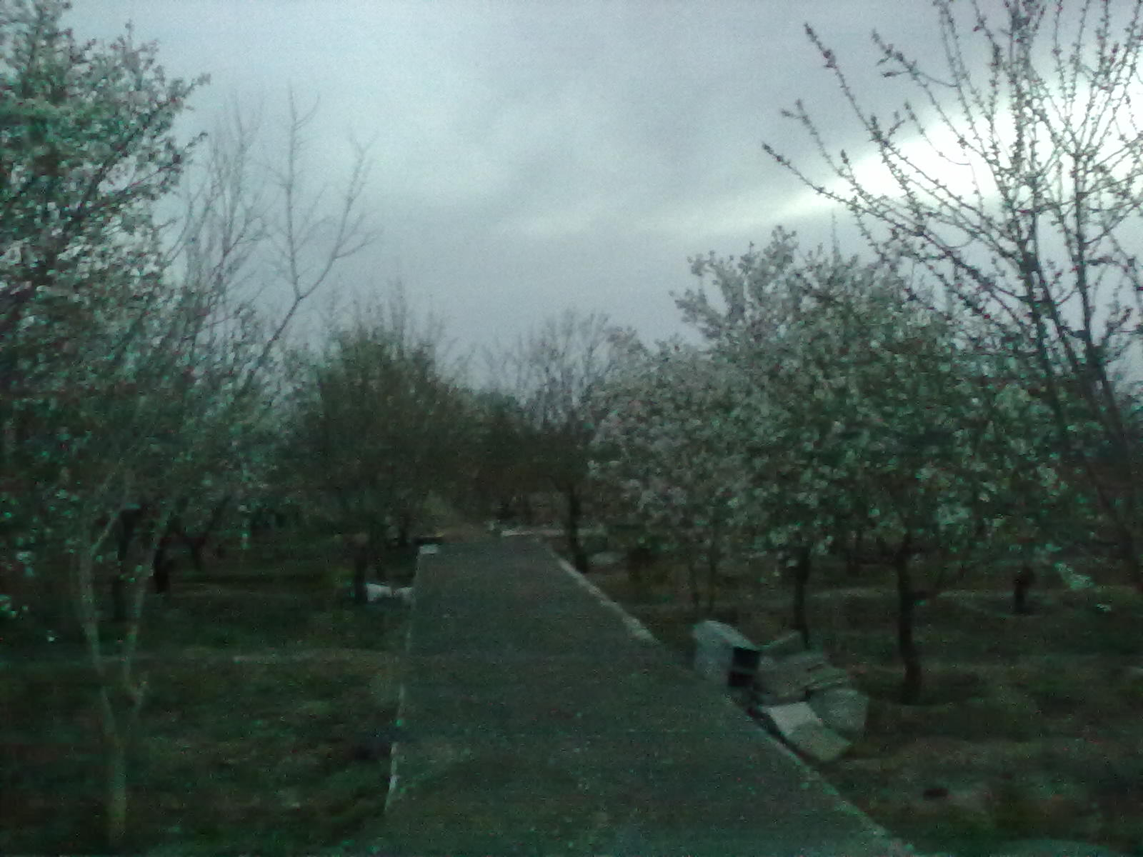 نمایی از یال (ویلاشهر تبریز)